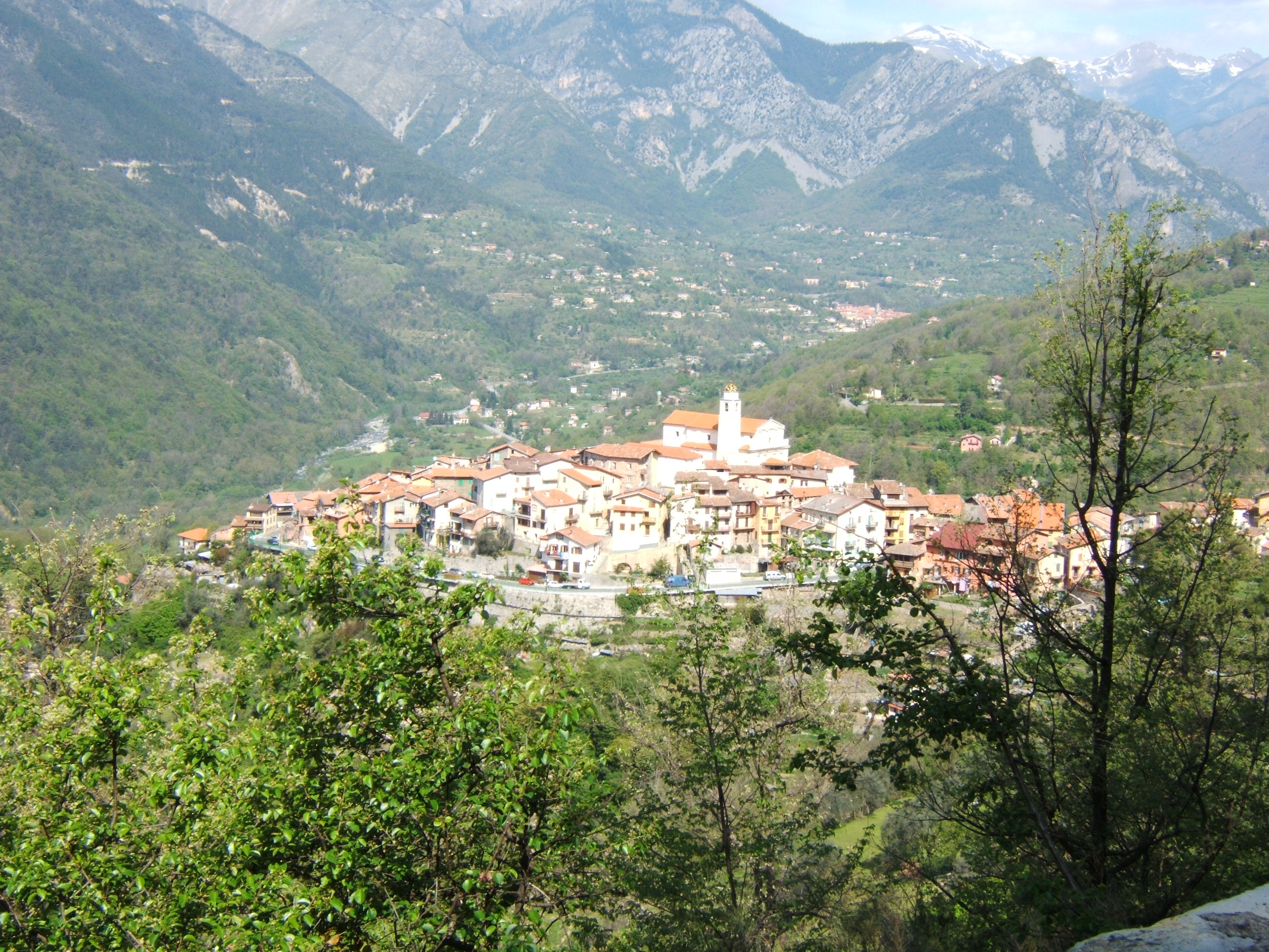 Le village de La Bollène Vésubie vu du versant nord du col de Turini, dans les Alpes-Maritimes..